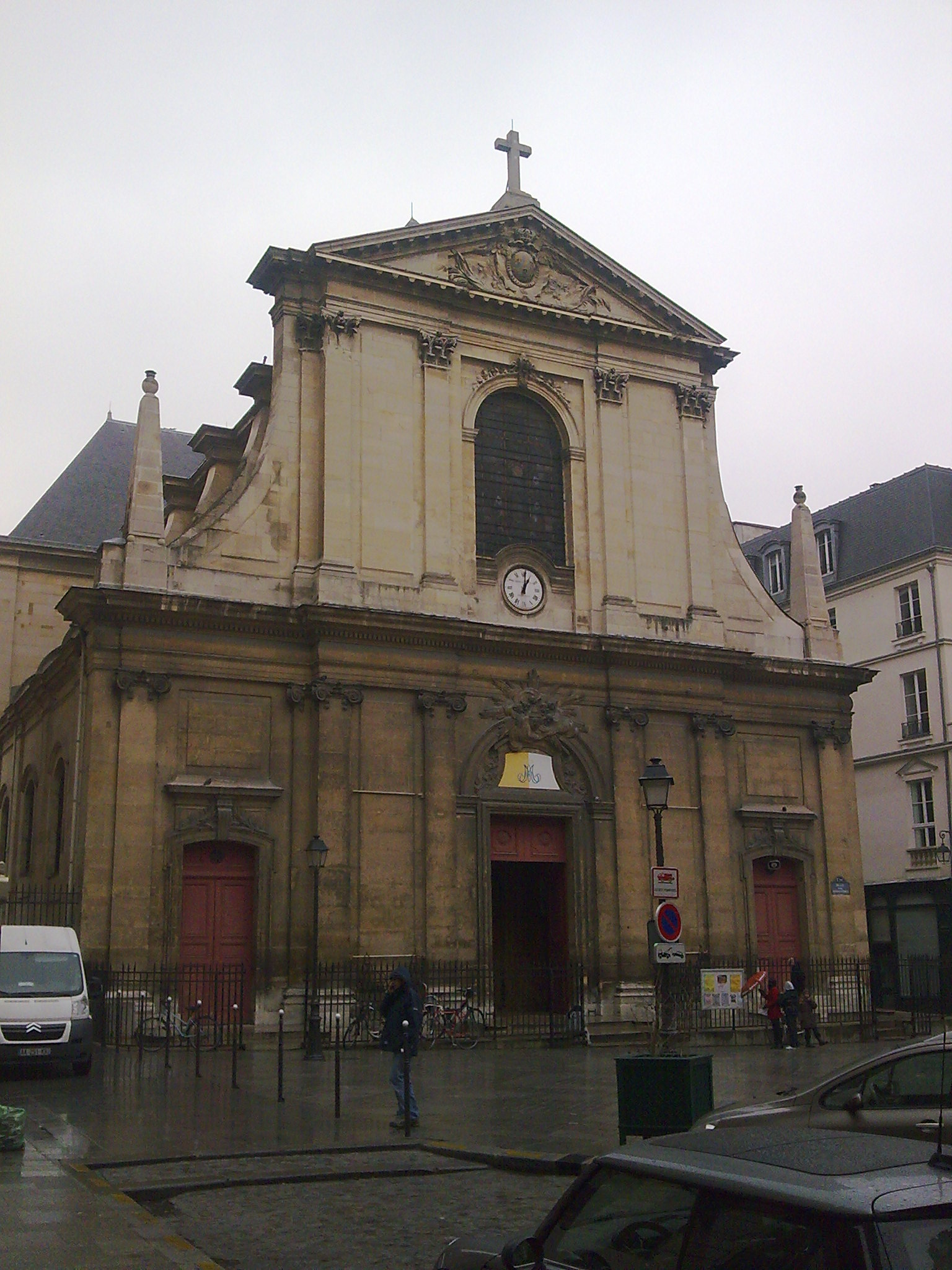 Façade avant de la Basilique Notre Dame des Victoires à Paris